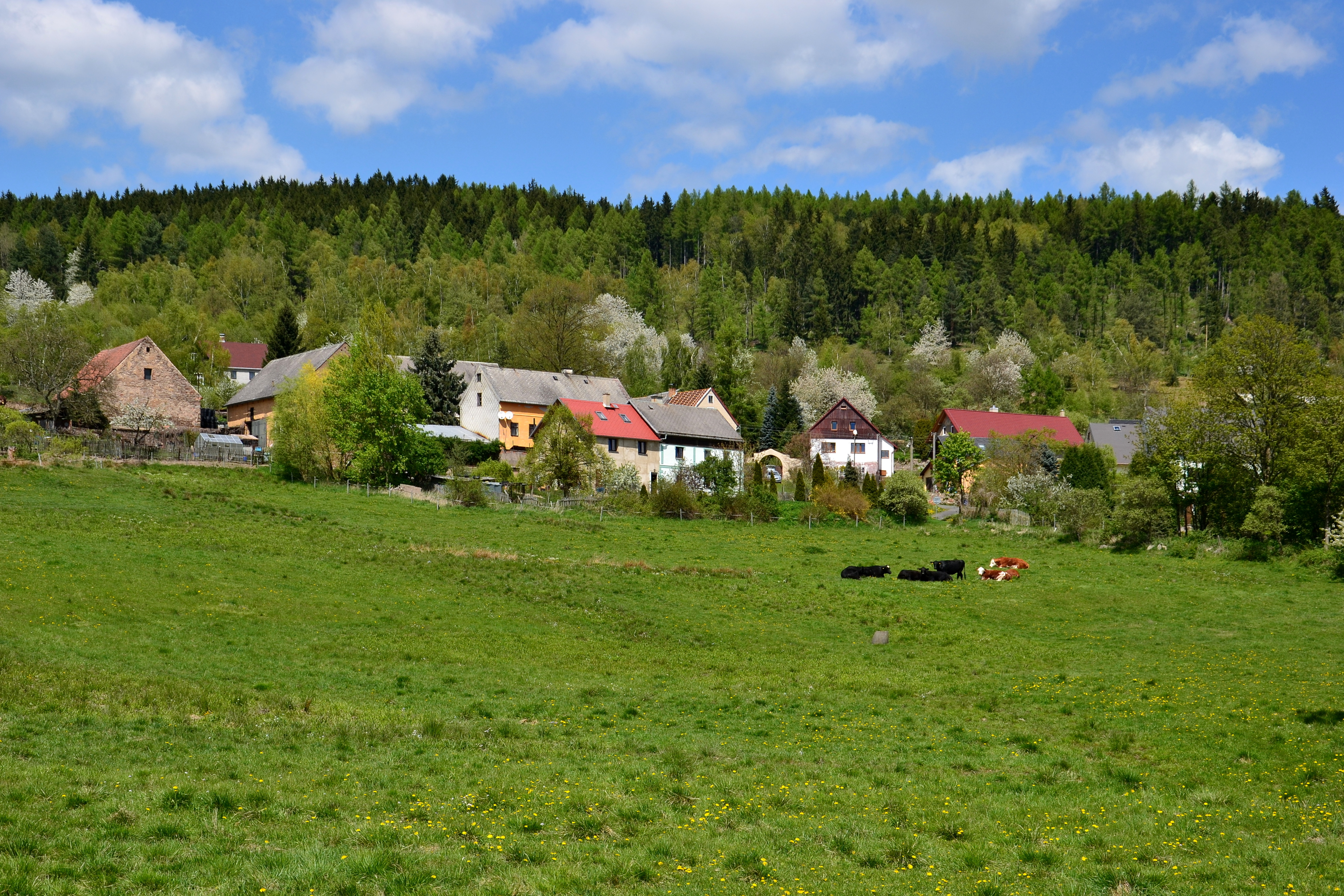 Klášterecká Jeseň – pohled od jihozápadu